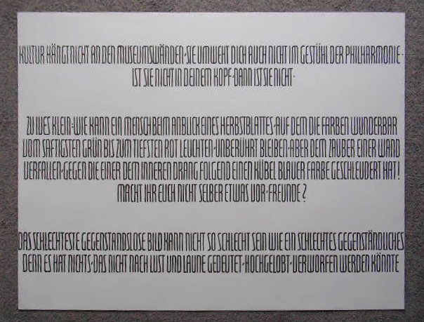 Kalligraphische Arbeit („Kultur hängt nicht …“), 2003, geschaffen von dem deutschen Bildhauer Heinz Klein-Arendt (1916–2005) aus Bergheim-Oberaußem.